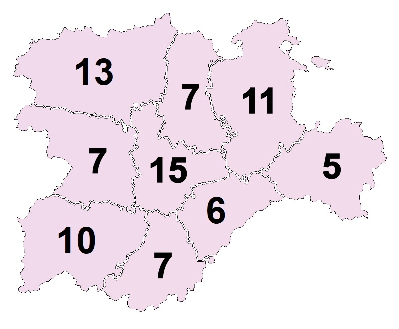 Distribución de escaños a repartir por provincia en las elecciones a las Cortes de Castilla y León de 2019